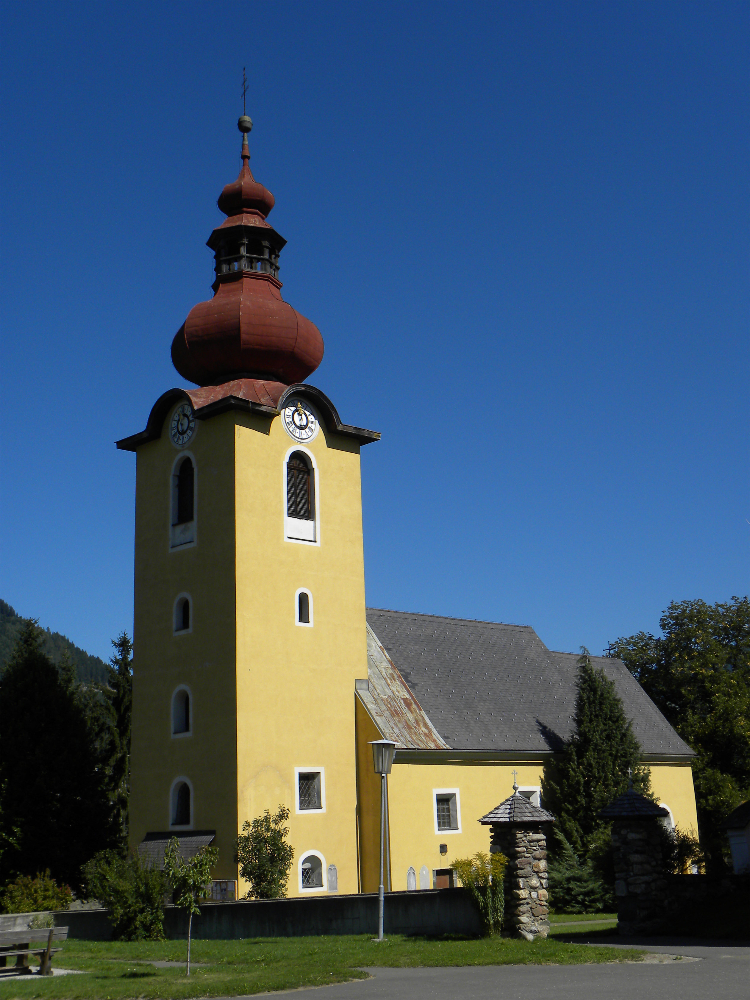 Kath. Pfarrkirche hl. Thomas und ehem. Friedhof